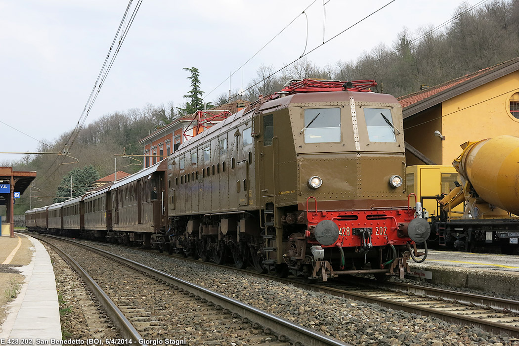 Il treno storico organizzato dalla Fondazione FS per celebrare l'80° anniversario della "Direttissima" Bologna-Firenze in sosta nella stazione di San Benedetto.